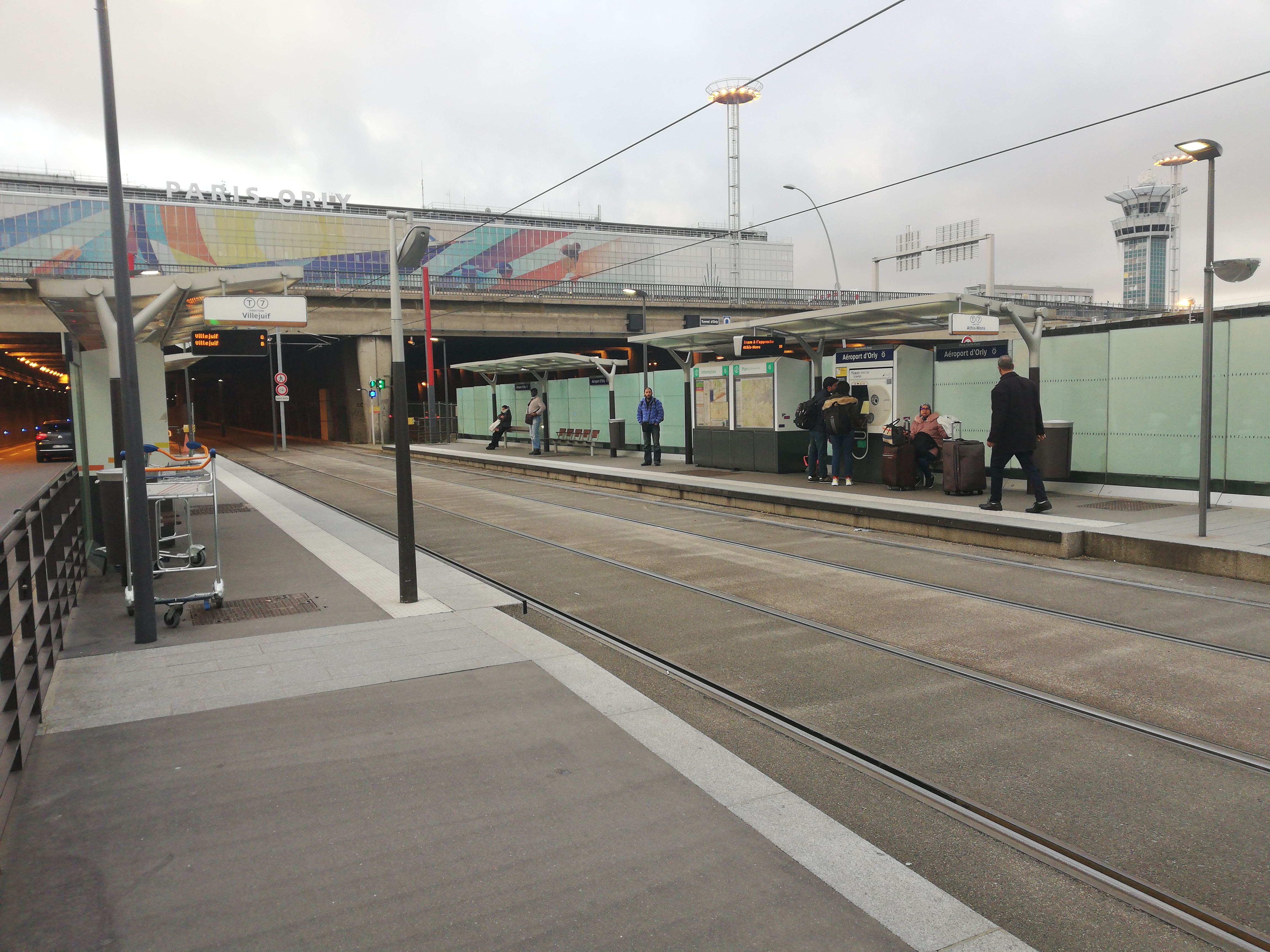 La station "Aéroport d'Orly" du tramway T7, ici en juin 2017.